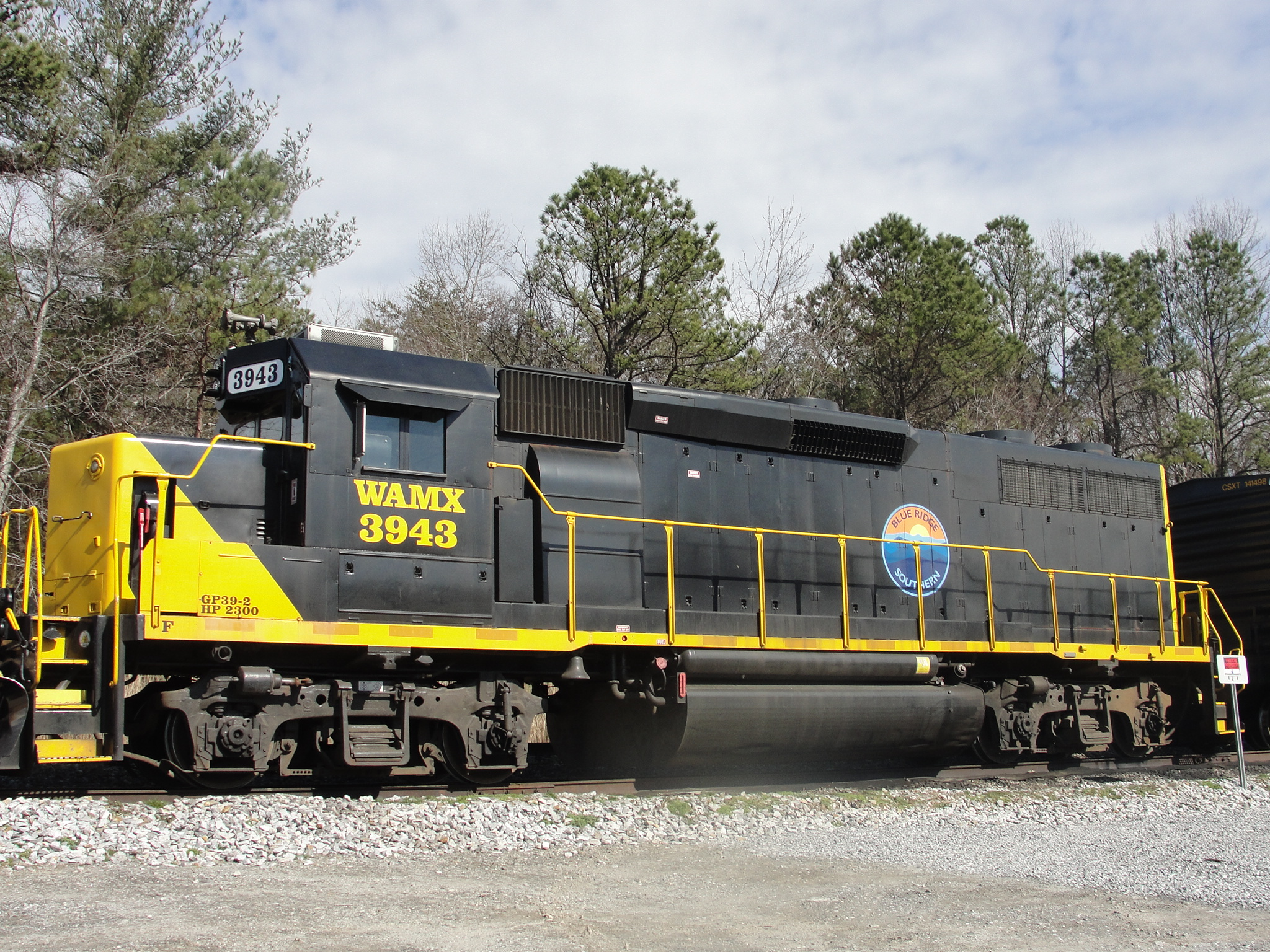 BLU 3943 at Arden.